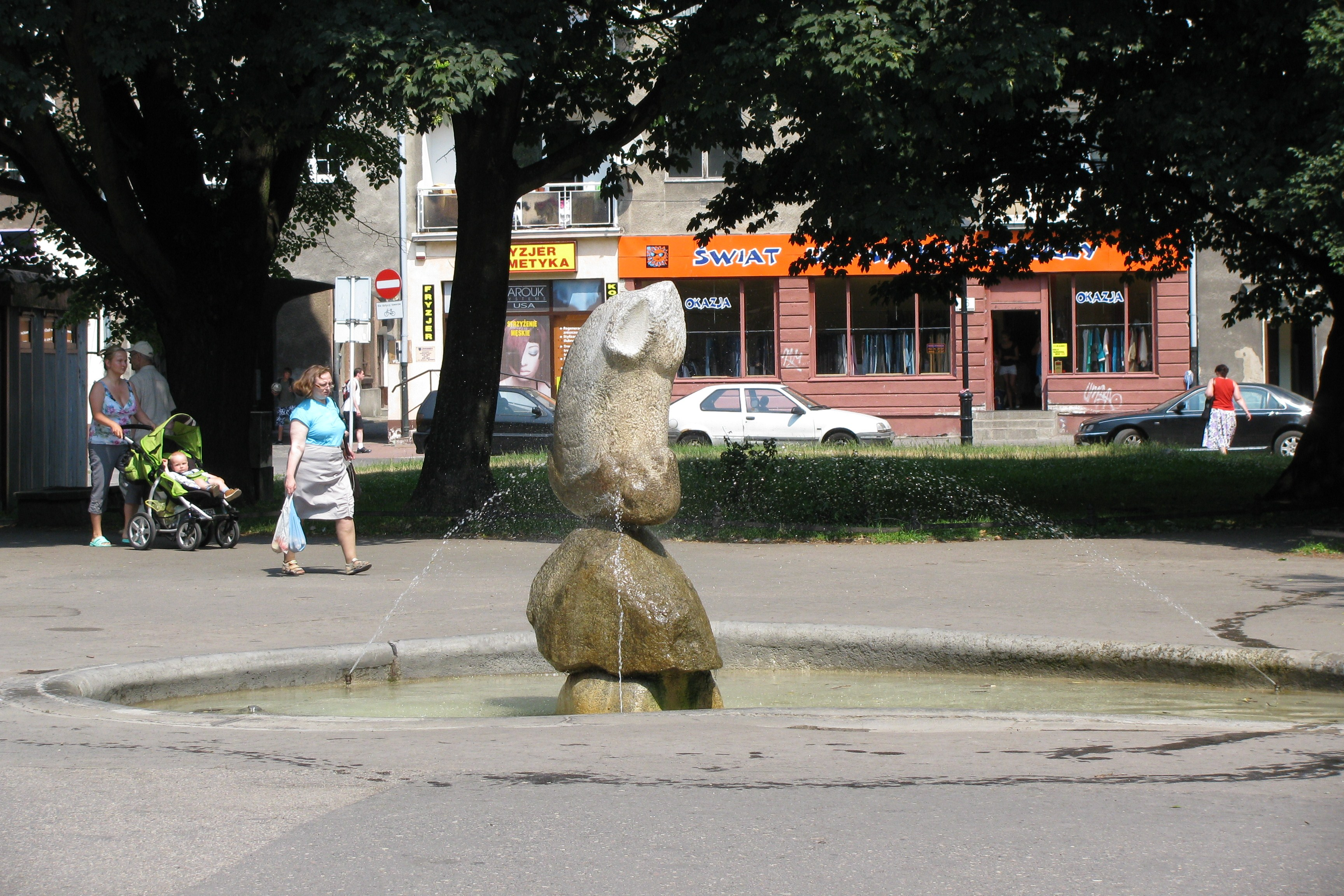 Skwer i fontanna (autor rzeźby Alfons Łosowski) przy ulicy Szerokiej w Gdańsku (Główne Miasto).